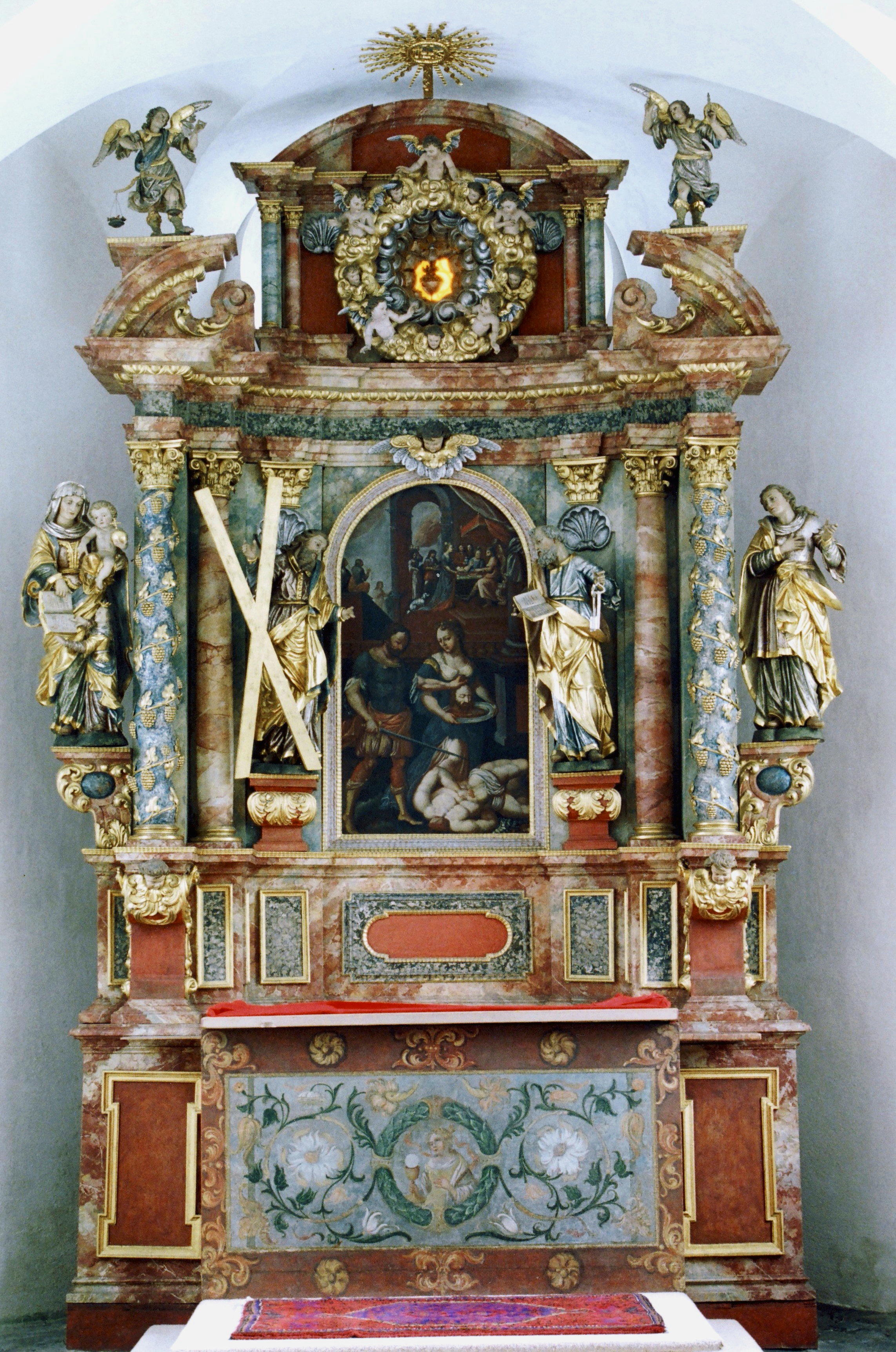 Nikolaus Babel: Altar in der Filialkapelle in Wank bei Nesselwang